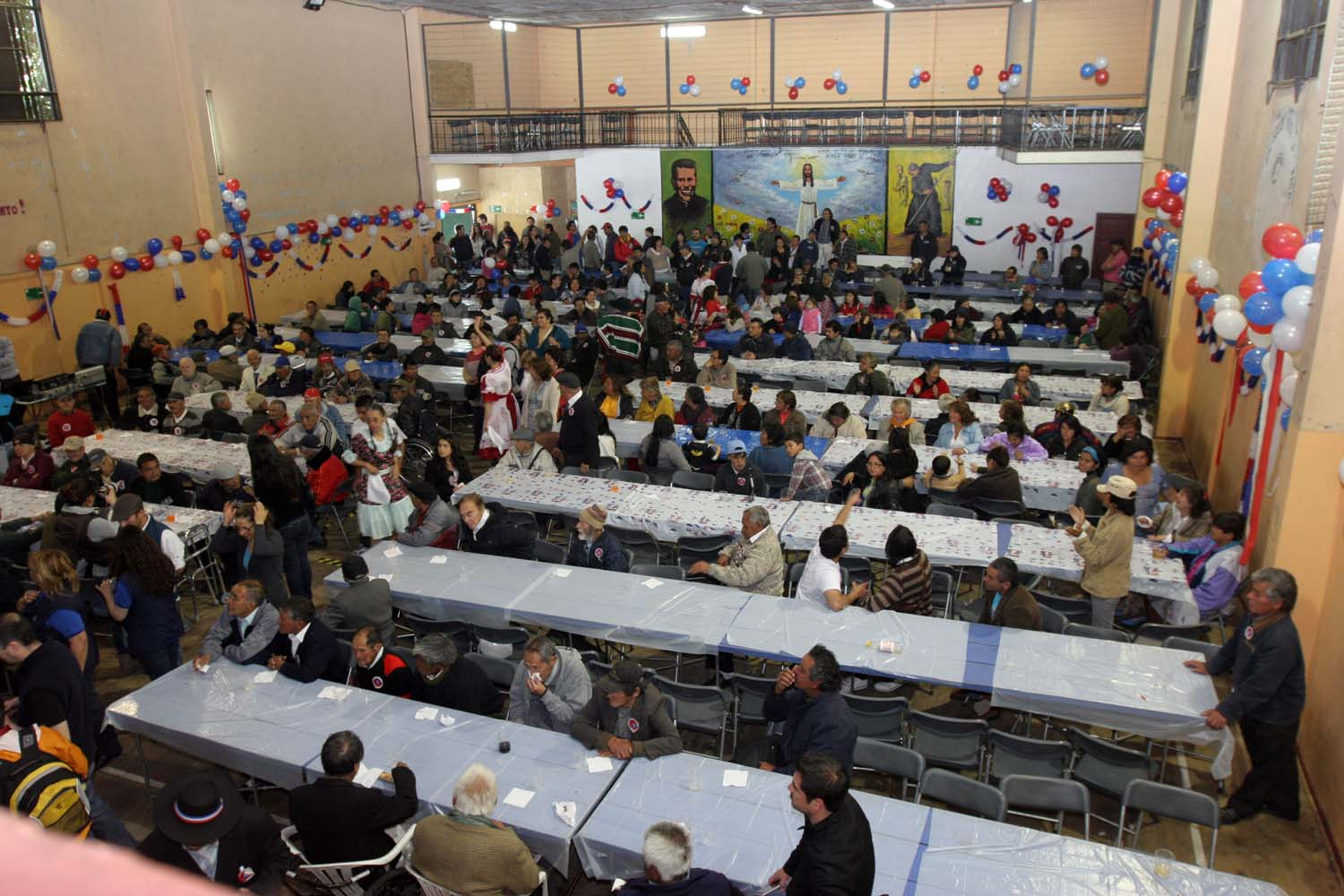 Junto a nuestros reyes guachacas 2011, Karen Doggenweiler y Fernando Farías, los cumpas del Sindicato del Banco del Estado y San Jorge celebramos el 18 Chico junto a 500 patriarcas y matriarcas acogidos por el Hogar de Cristo.